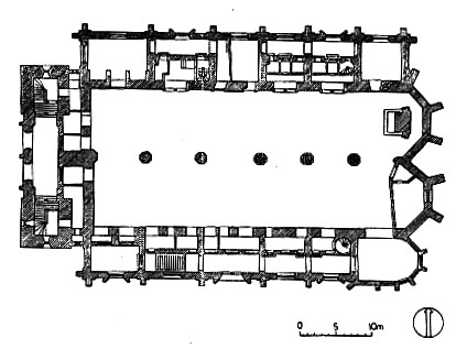 Grundriss der Dresdner Sophienkirche nach dem Umbau ab 1864